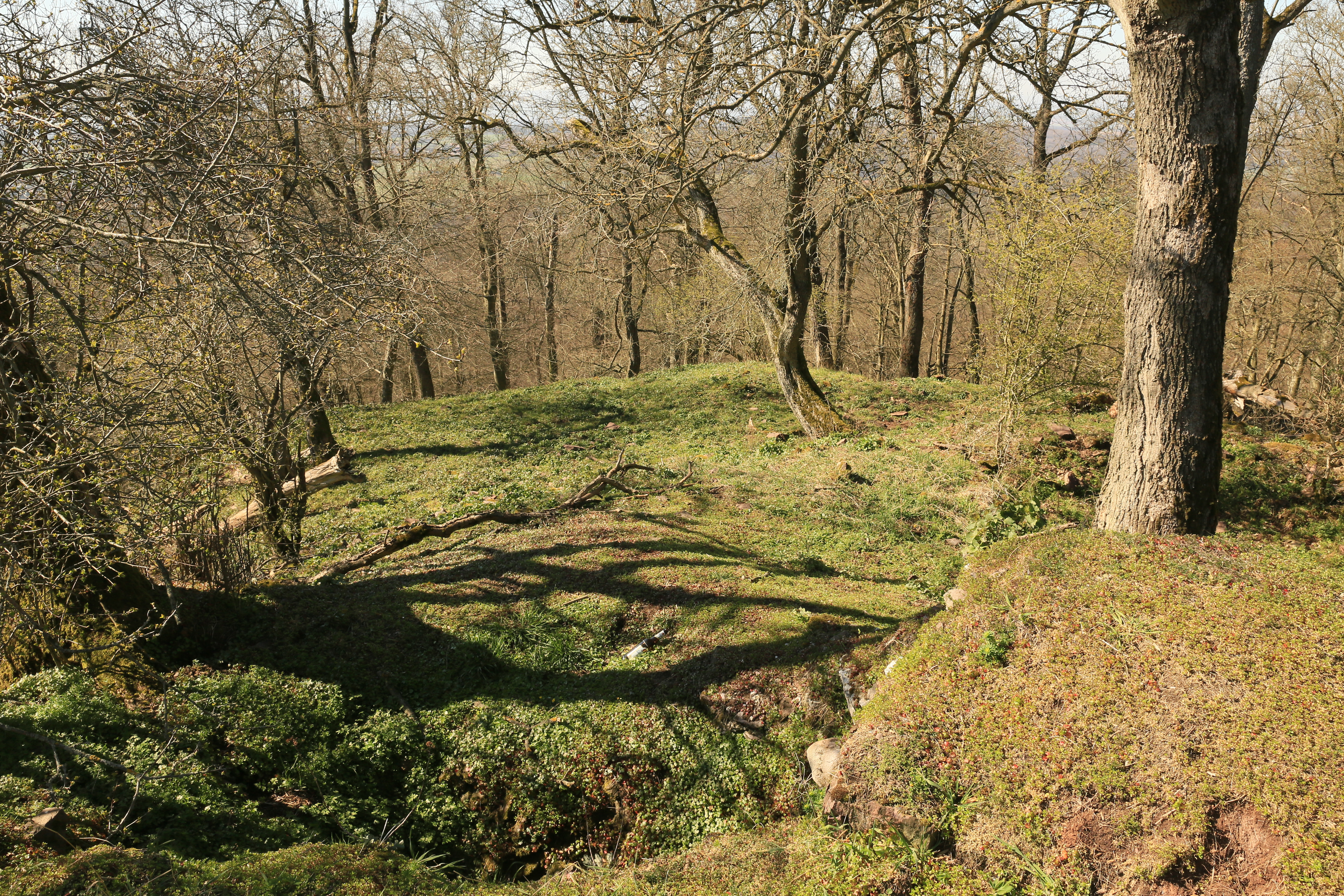 Blick vom Turm zur Vorburg